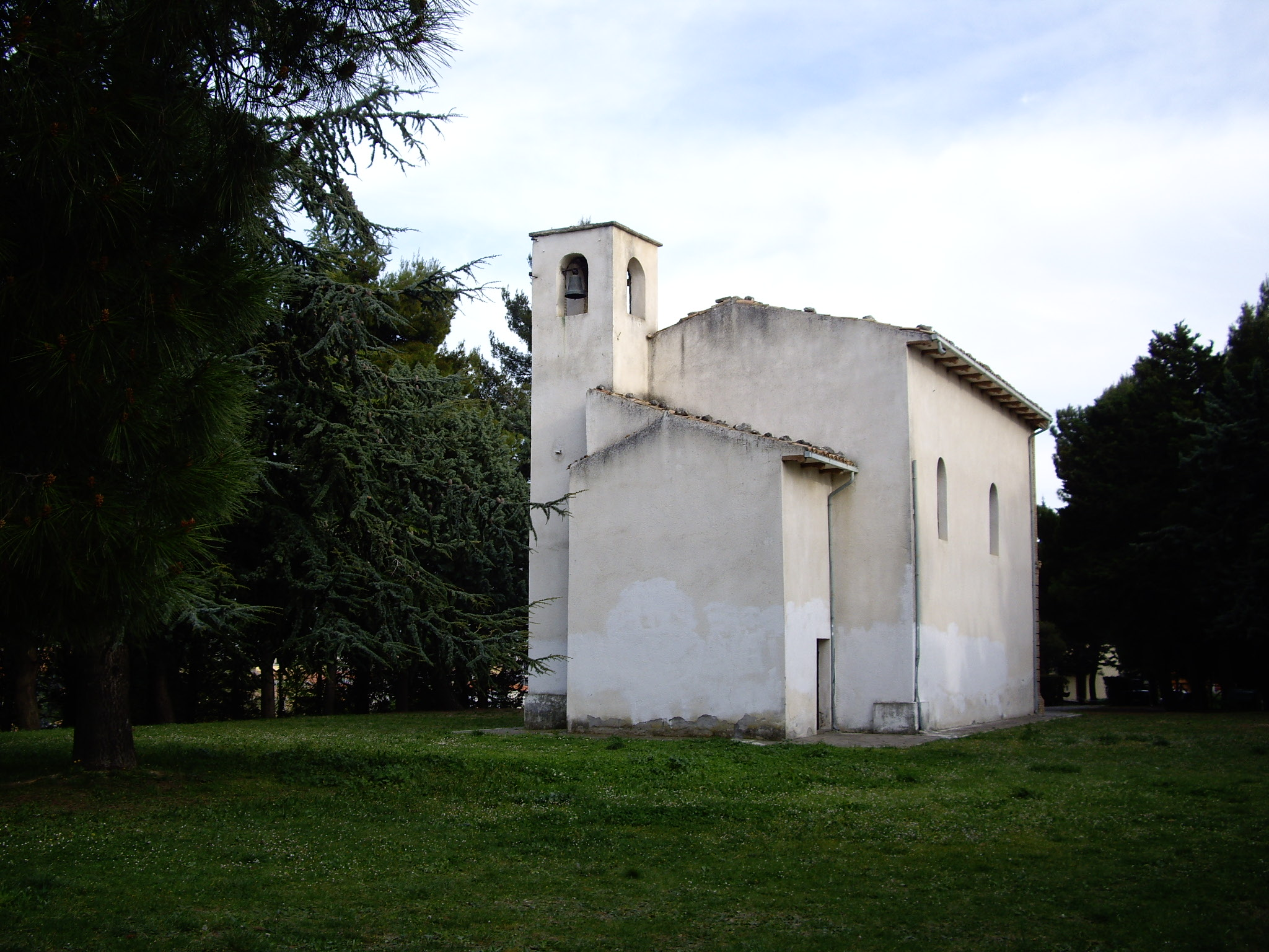 Autore: Giuseppe Paolelli - Vista posteriore della Chiesetta di S.Lucia situata nell'omonima pineta.